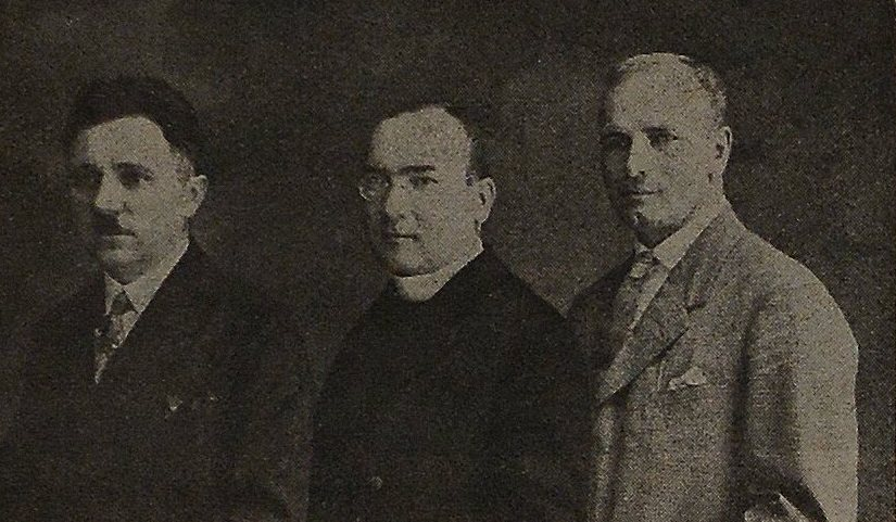 TG Sokół Dziedzice Franciszek Łaszczak, ks. Kozjar, Jan Siwy